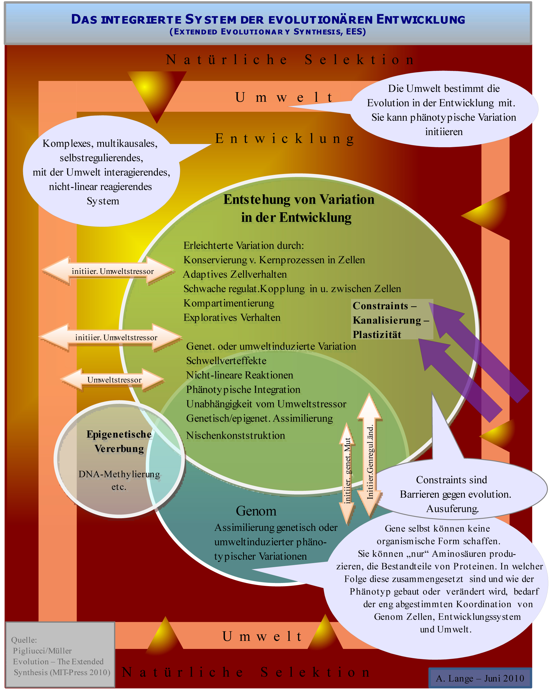 Integriertes evolutionäres Entwicklungssystem